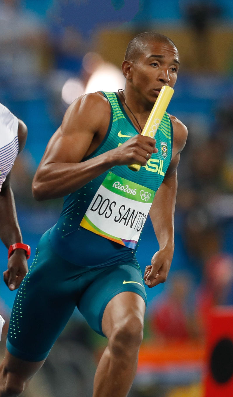 Rio de Janeiro - Eliminatórias do revezamento 4 x 400m nos Jogos Rio 2016, no Estádio Olímpico (Fernando Frazão/Agência Brasil)